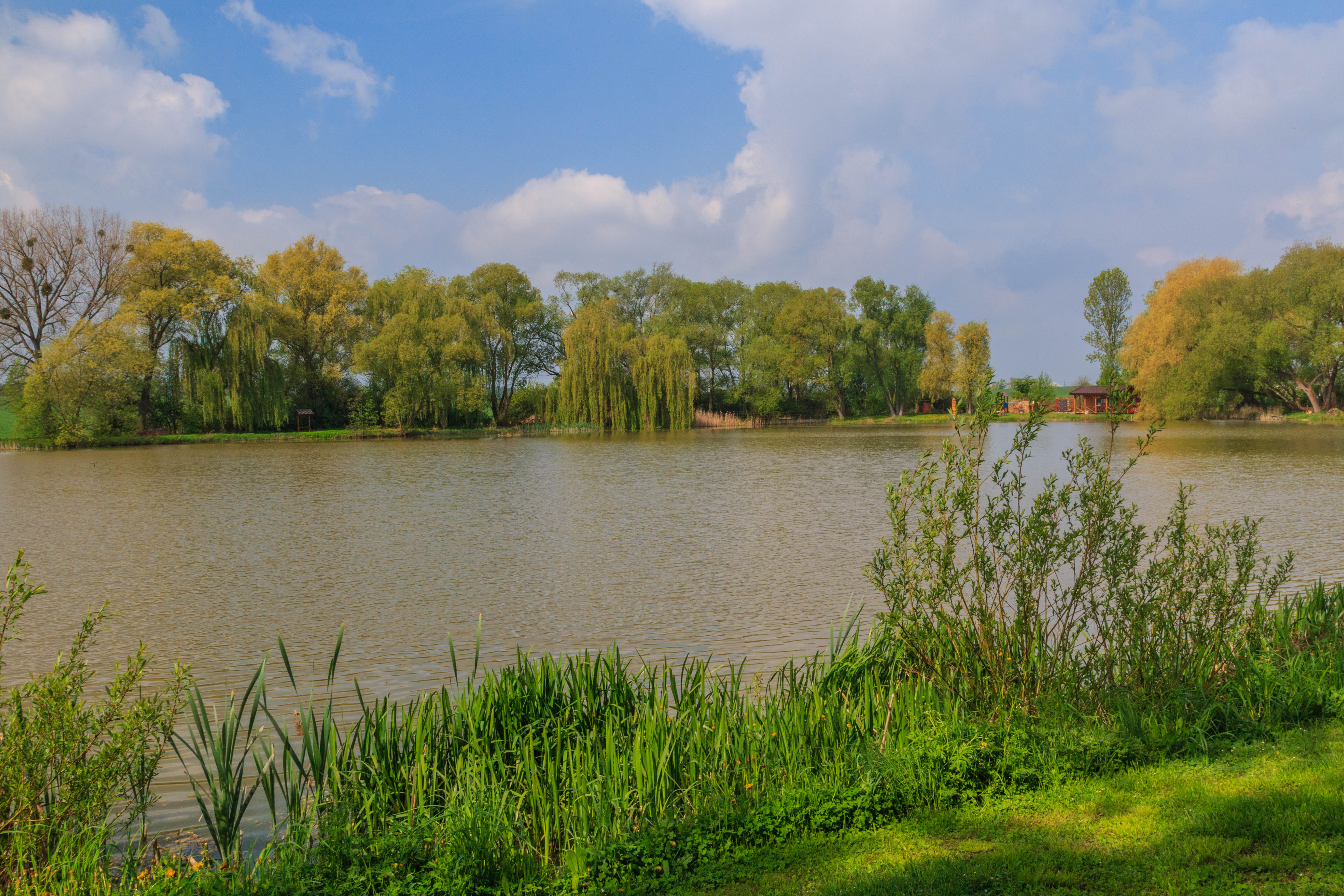 Jedousovský rybník Project: Vodstvo.